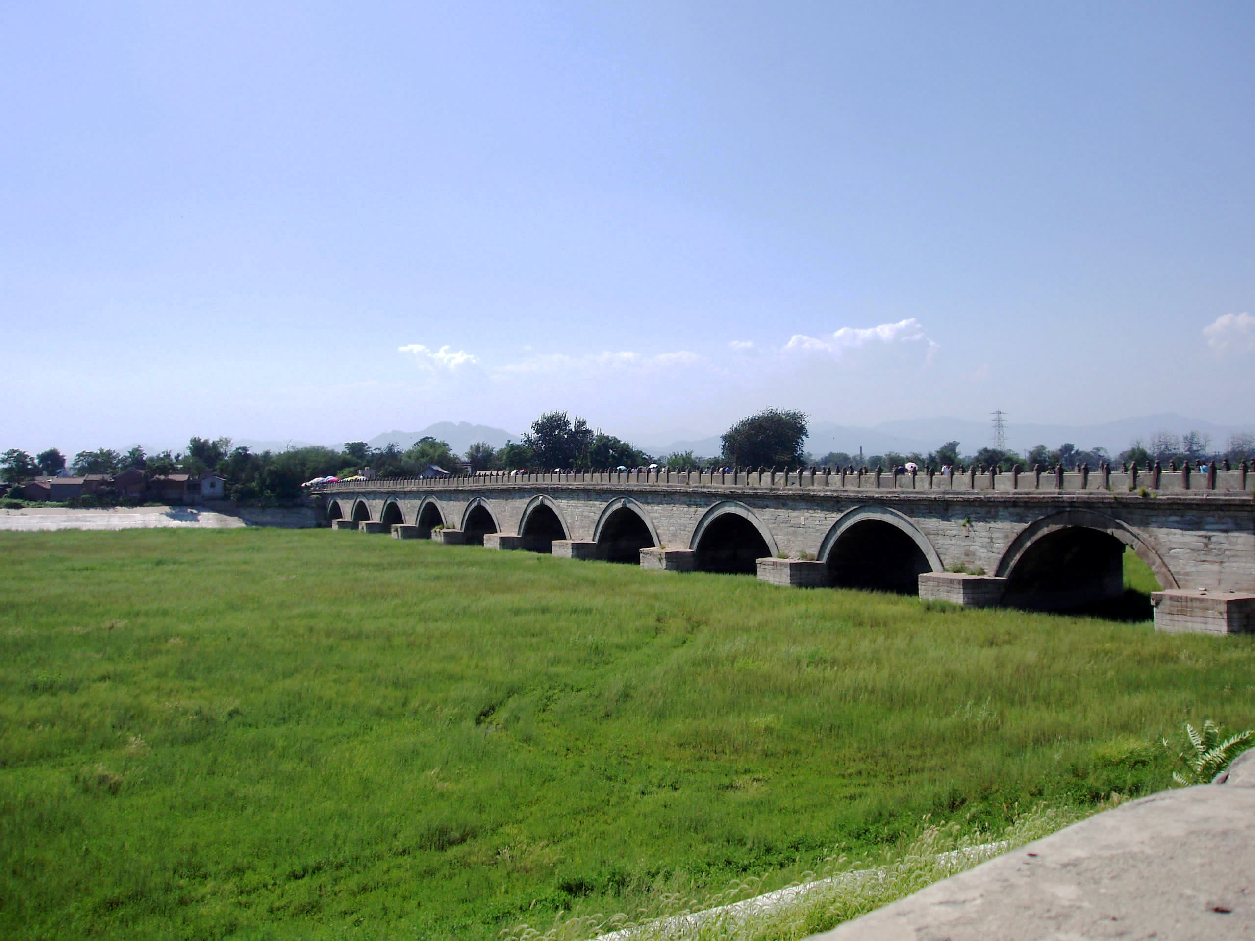 Marco Polo Bridge (Lugouqiao, 卢沟桥)